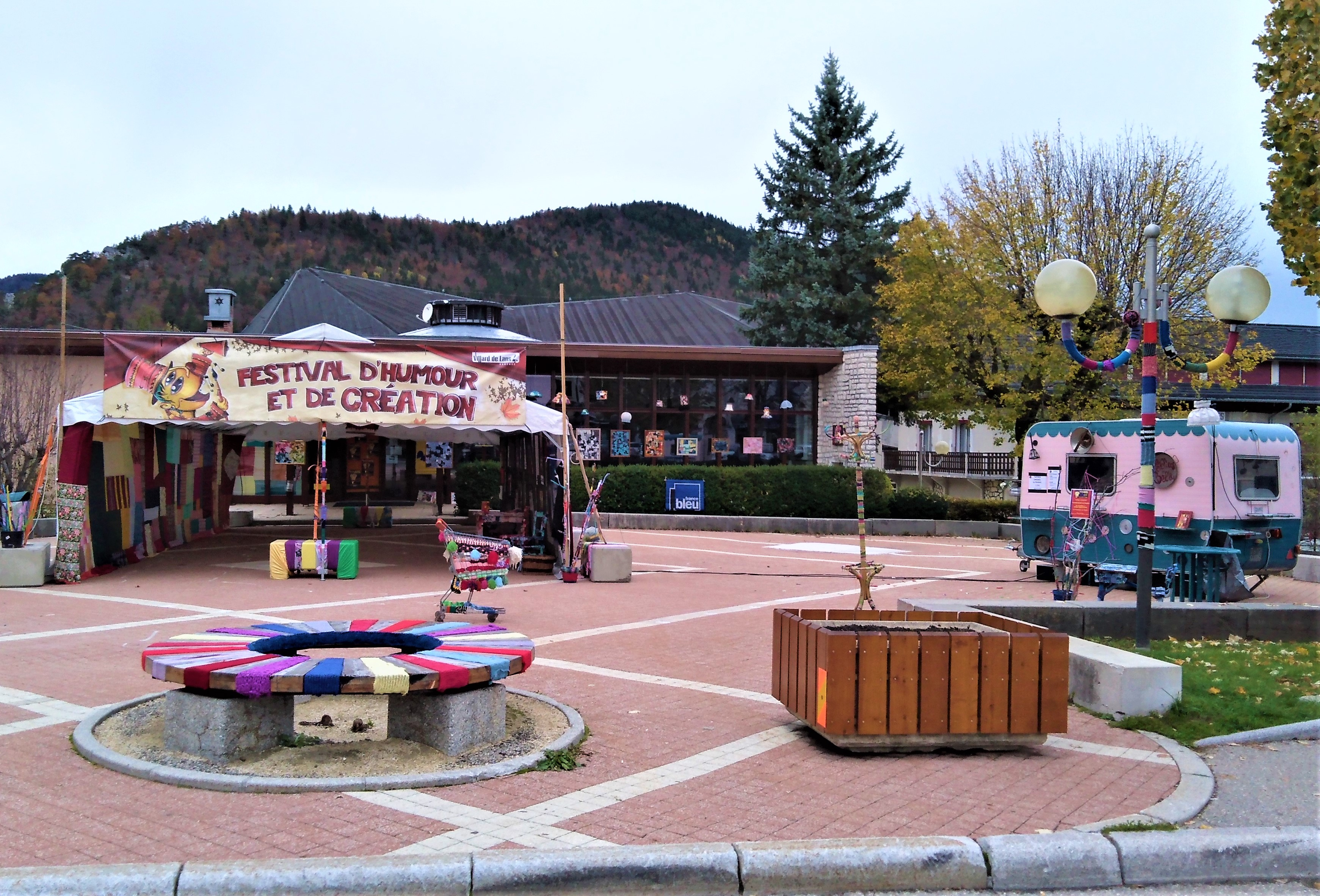 La coupole lors du festival d'humour et création en novembre 2019